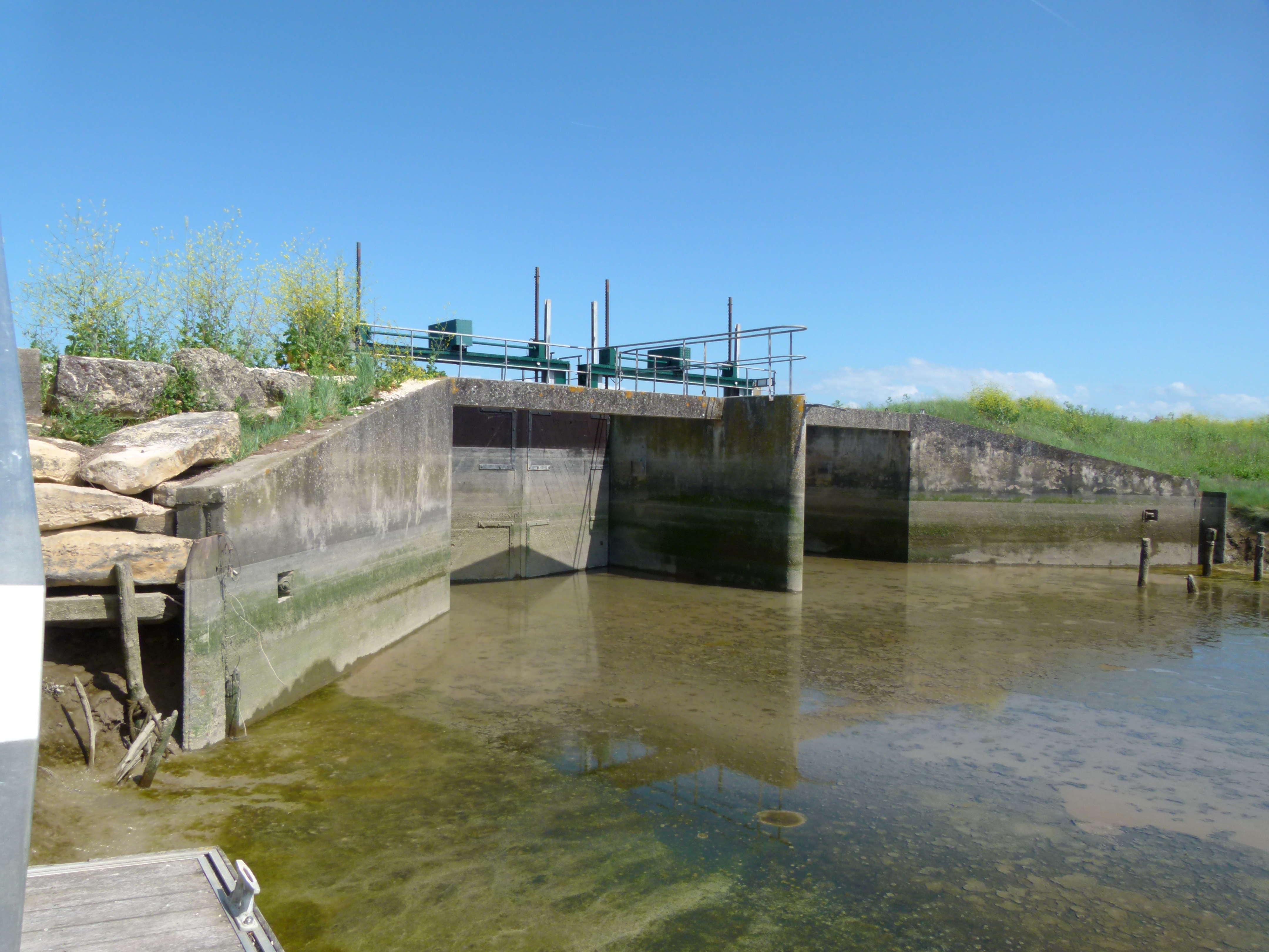 Les portes à flots du canal du Curé sont situées dans la partie méridionale de Charron (17)